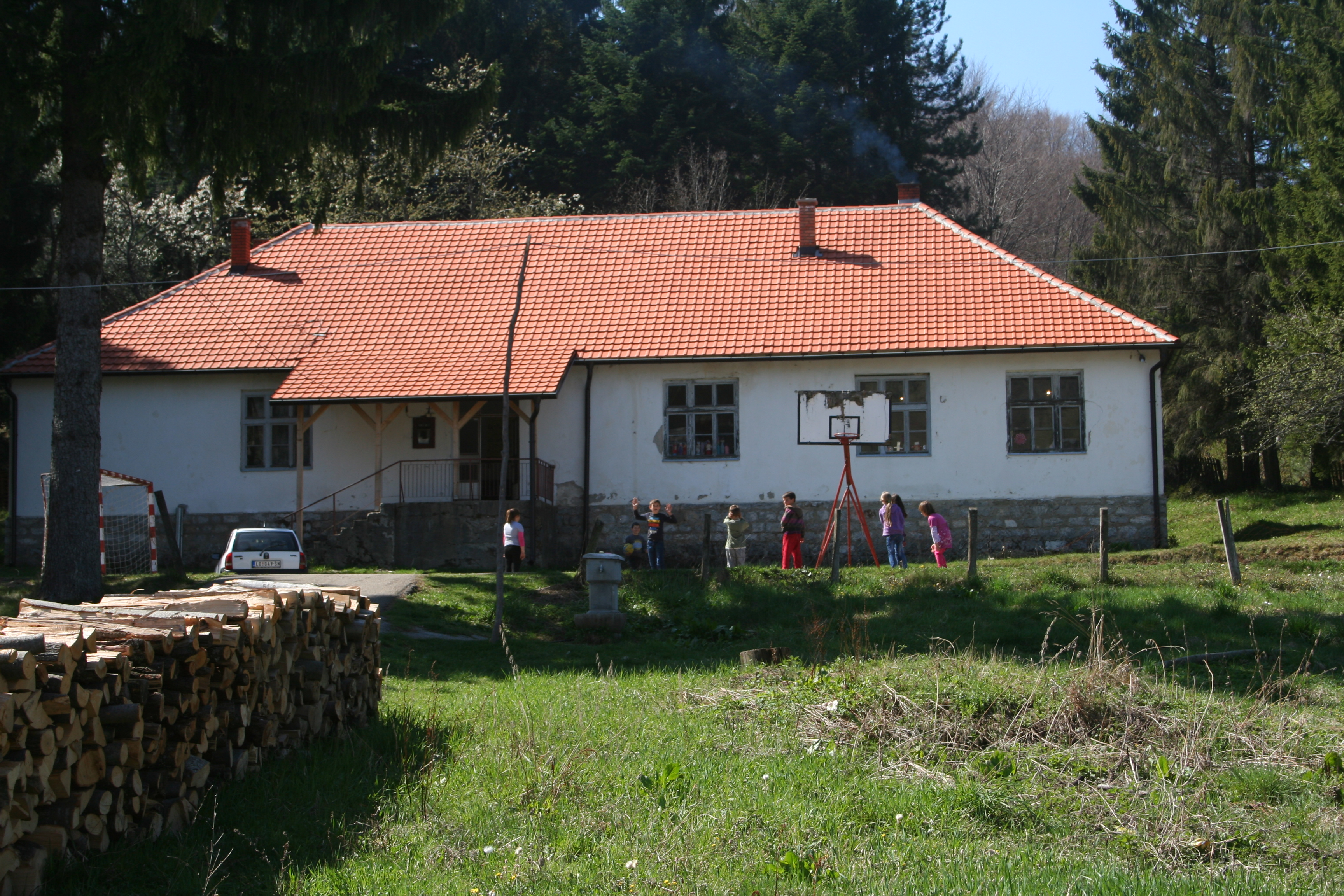 Put za Bobiju, škola Gornje Košlje